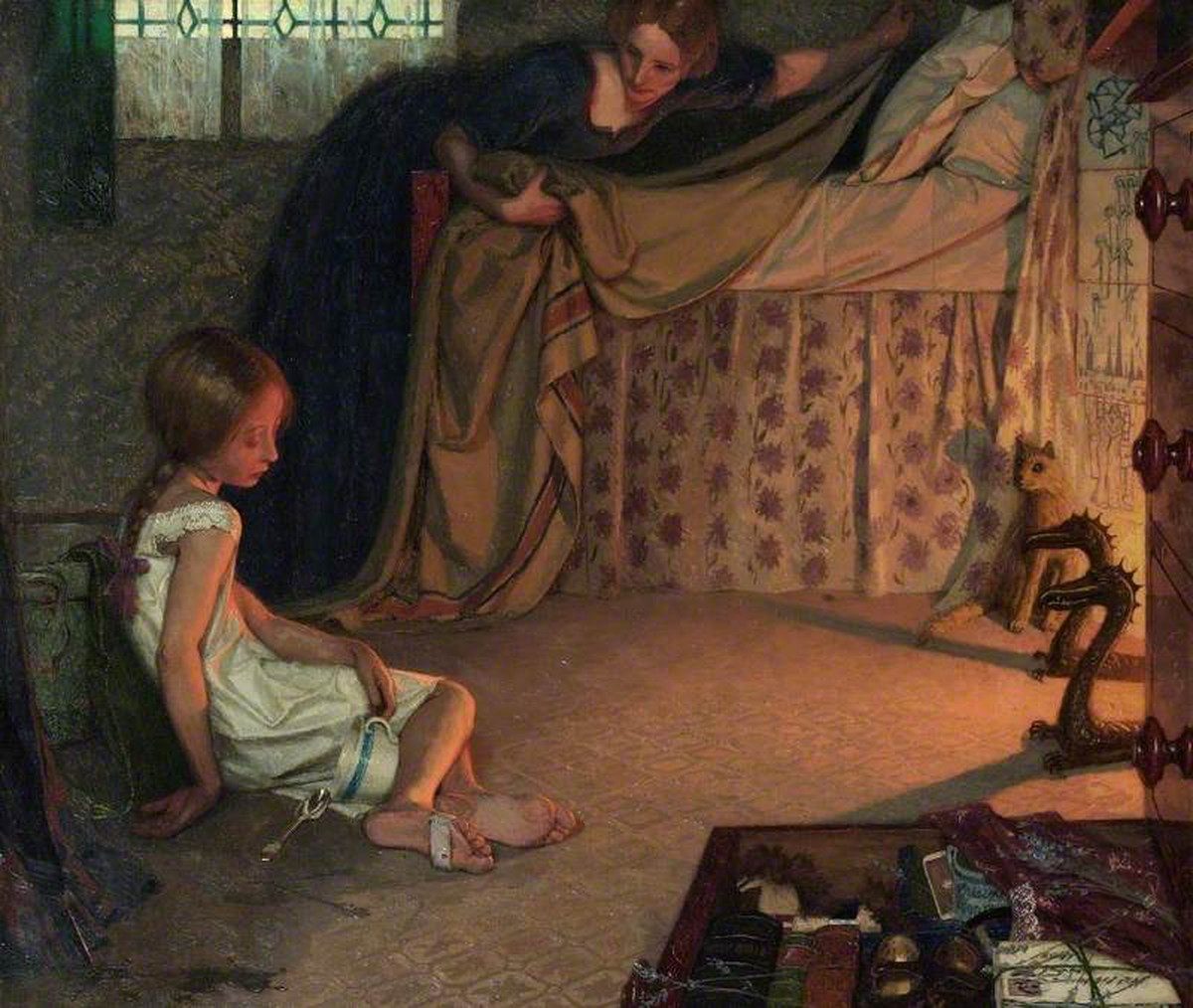 Frederick Cayley Robinson, 18 августа 1862, Брентфорд, Лондон, Великобритания — 4 января 1927, Великобритания). Тhe Foundling, 1896